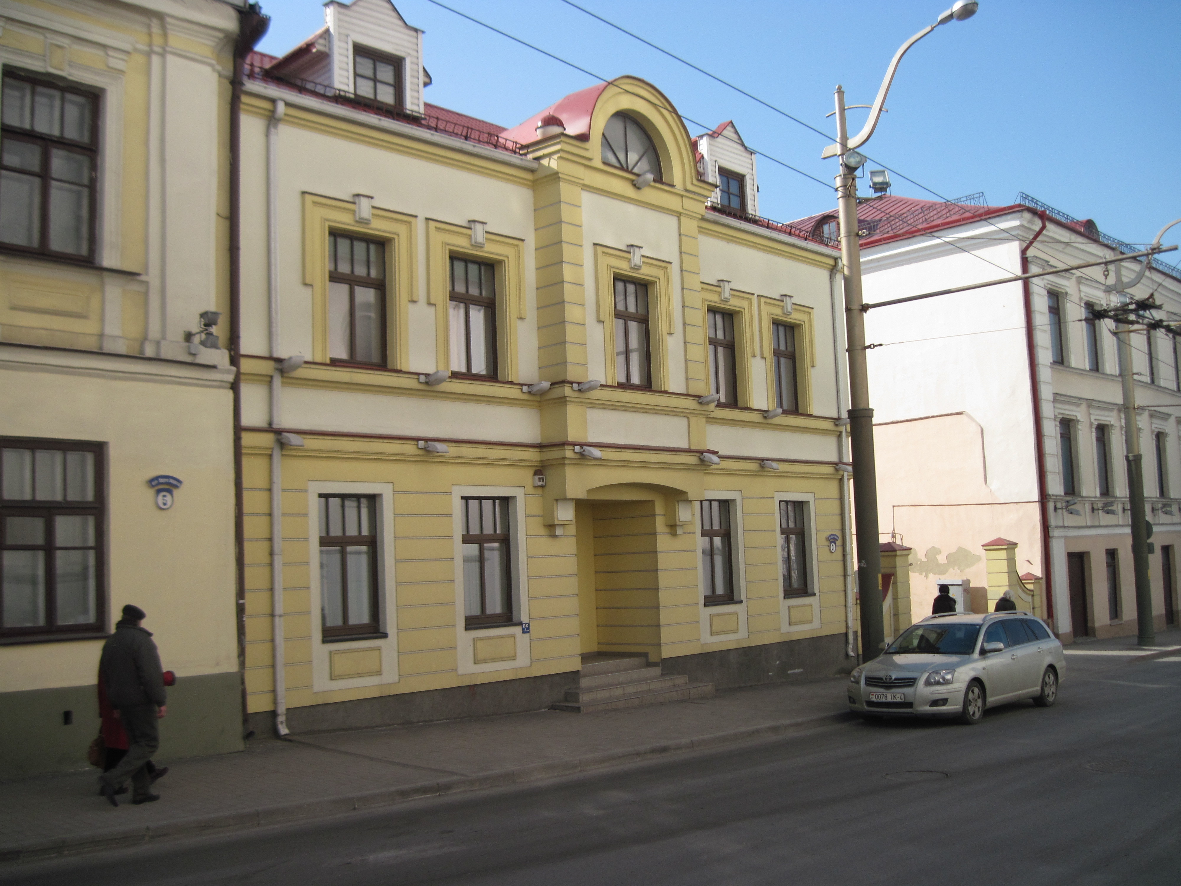 Беларуская (тарашкевіца): Забудова гістарычнага цэнтра Гродна. Дом па вуліцы К. Маркса, 3